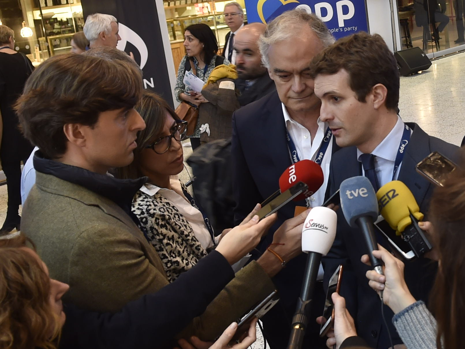 7 November 2018